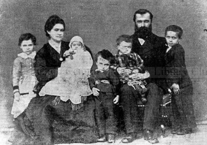 Ioan Maniu - familia -- Dela stanga spre dreapta : Elena, Clara Manlu, Sabina, Ioan, Iullu, loan Maniu, Casiu